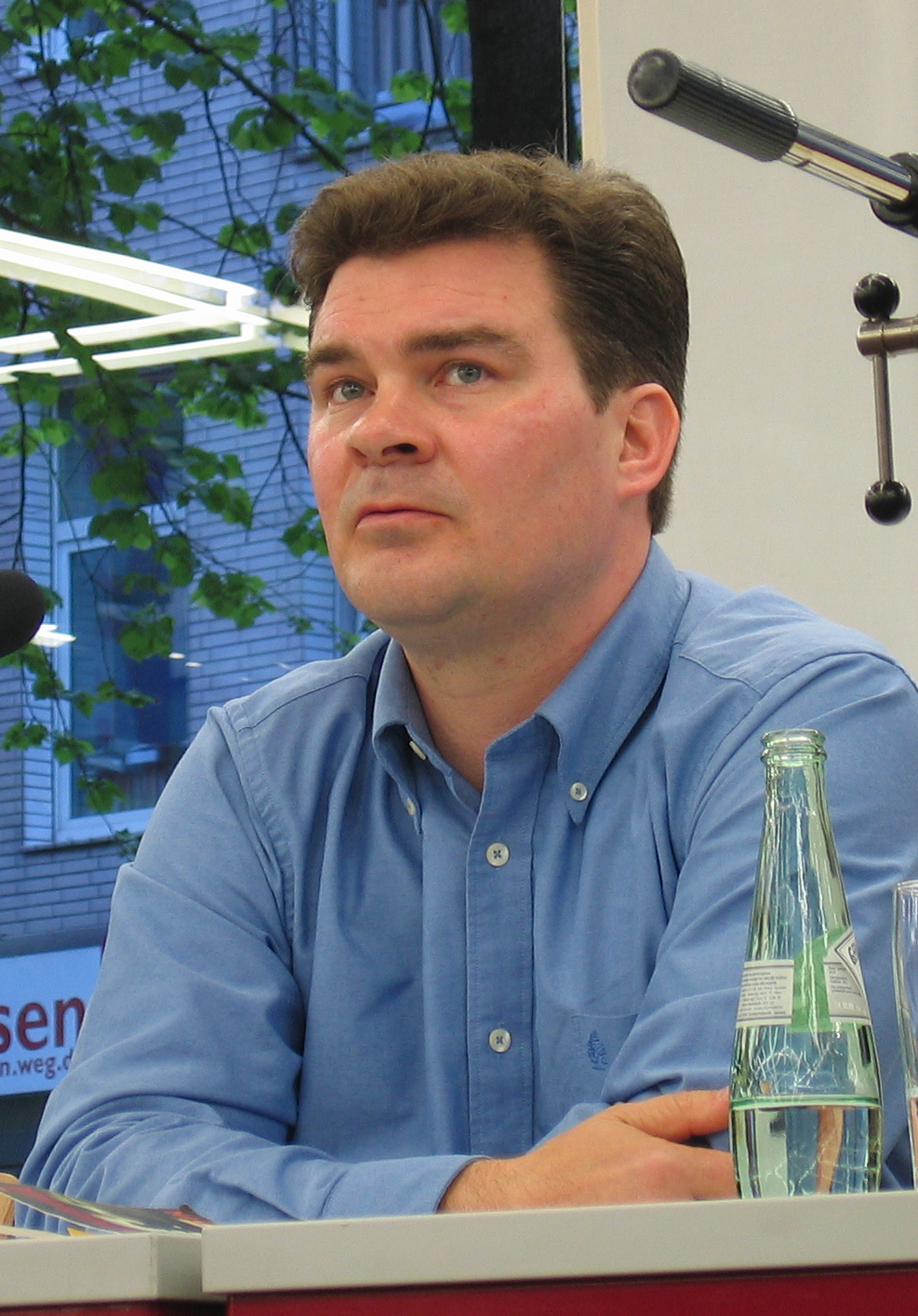 Der finnische Schriftsteller Taavi Soininvaara präsentiert sein Werk in der Kölner Stadtbibliothek. April 2008